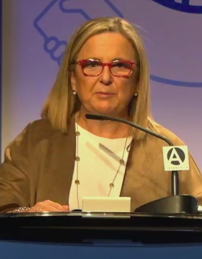 III Diálogos del Agua América Latina-España Luis Carranza. Presidente Ejecutivo, CAF Irene Garrido Valenzuela. Secretaria de Estado de Economía y Apoyo a la Empresa, España Isabel García Tejerina. Ministra de Agricultura y Pesca, Alimentación y Medio Ambiente, España Casa de América (Madrid), 23 de octubre de 2017